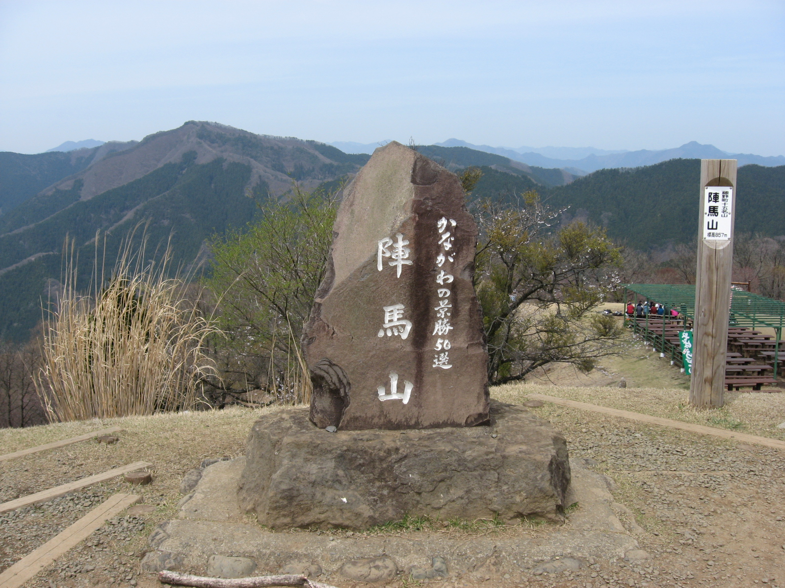 陣馬山山頂の「かながわの景勝50選」の碑